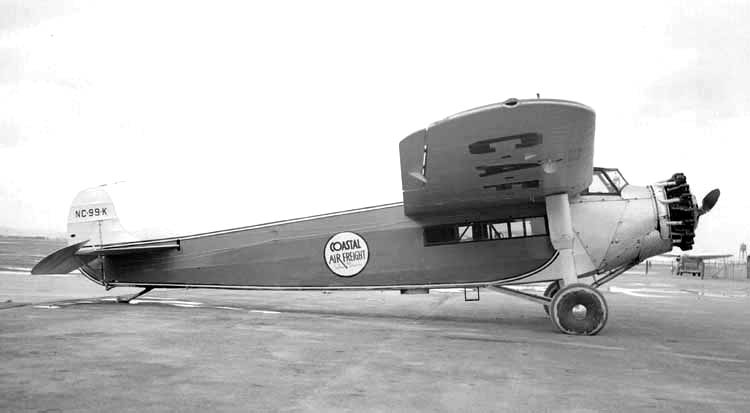 FokkerSupUnivCAF